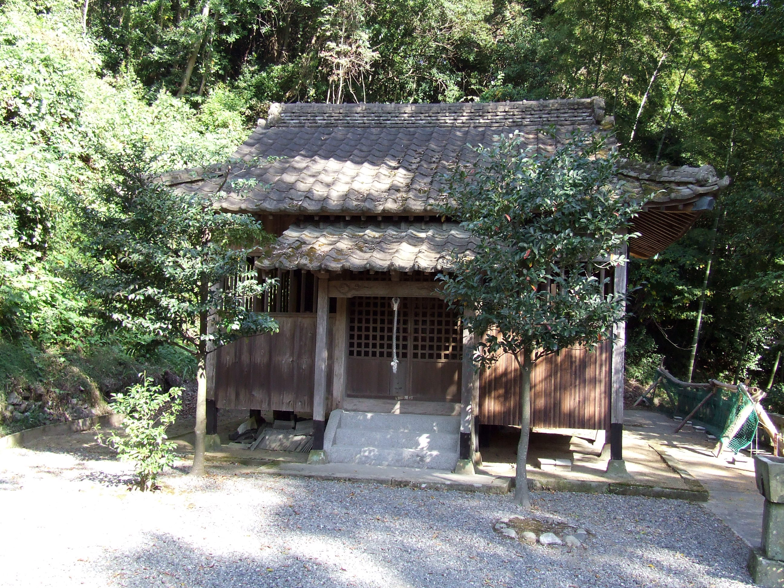 室園神社